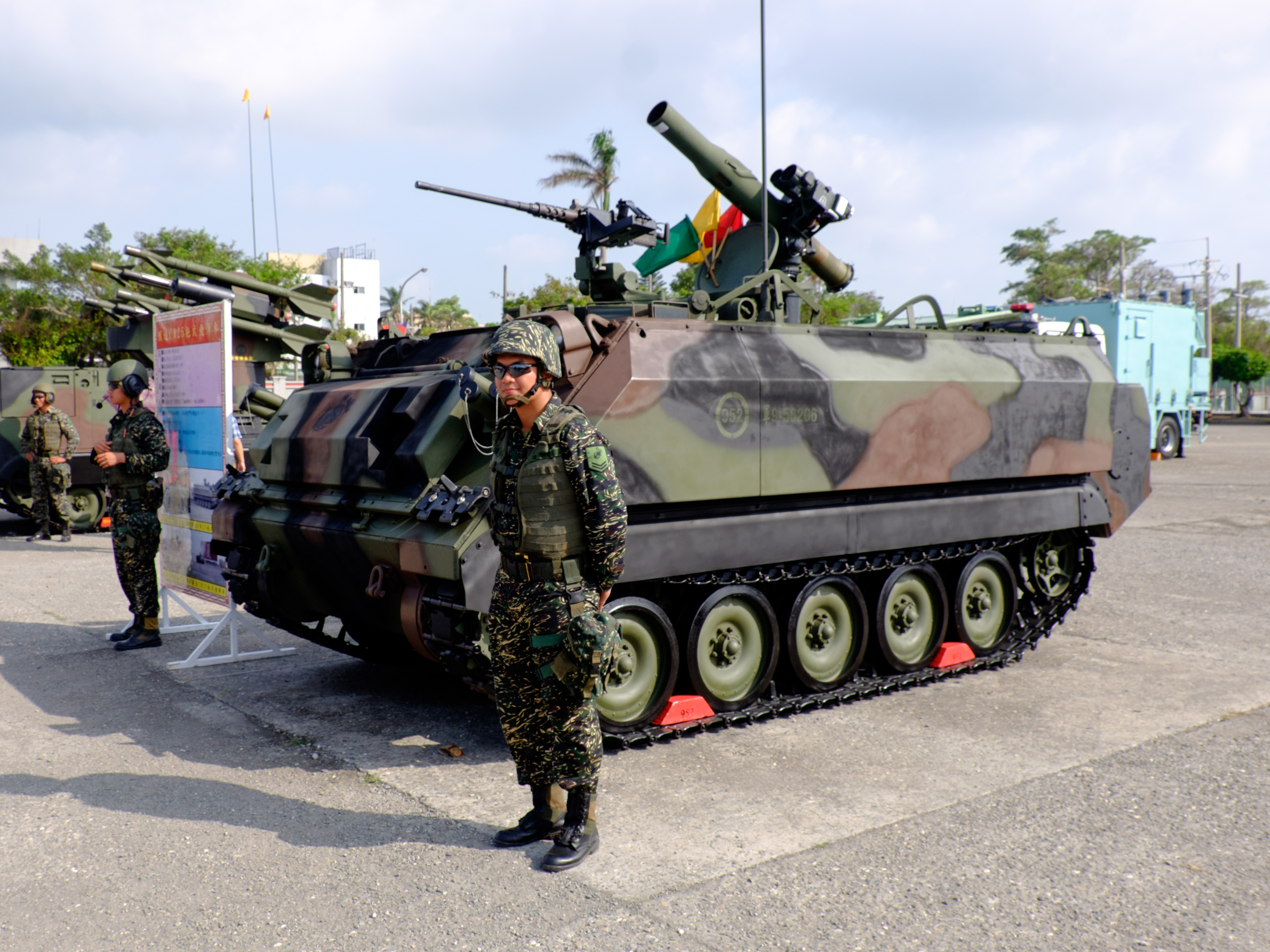 2015年左營軍港營區開放活動，艦隊指揮部操場展示的海軍陸戰隊CM-25拖式飛彈裝甲車。